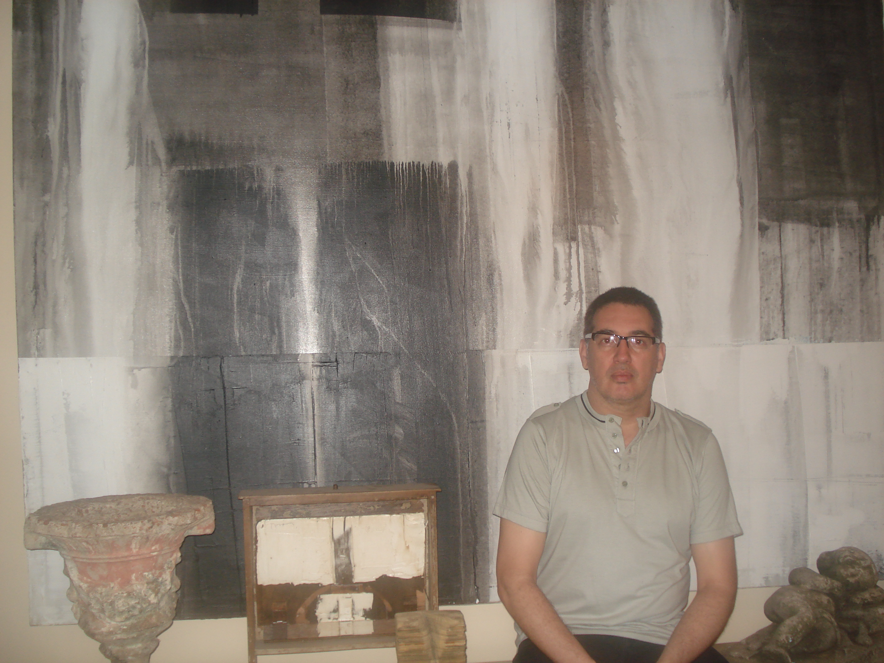 Félix Toranzos y su obra